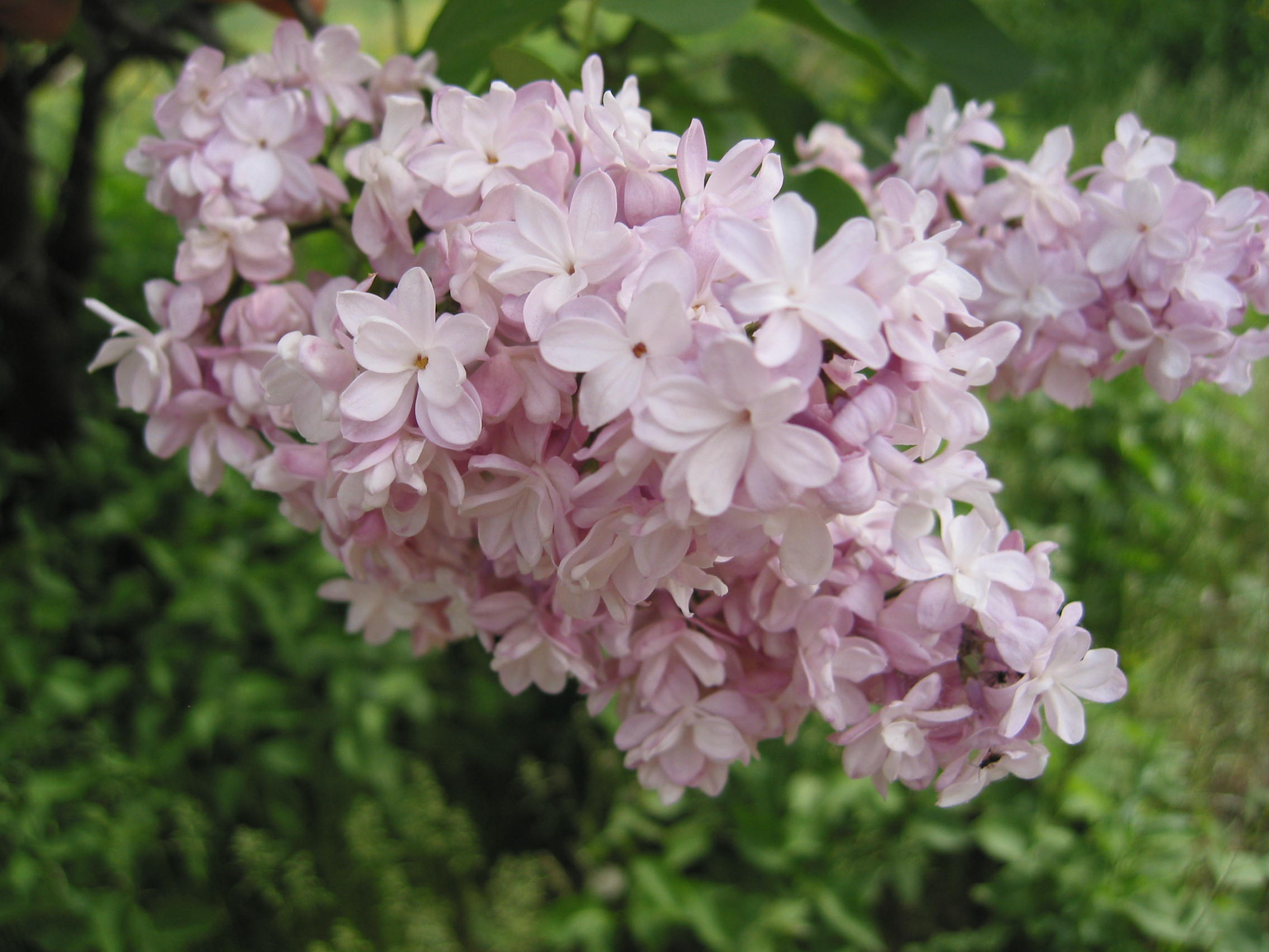 Растение